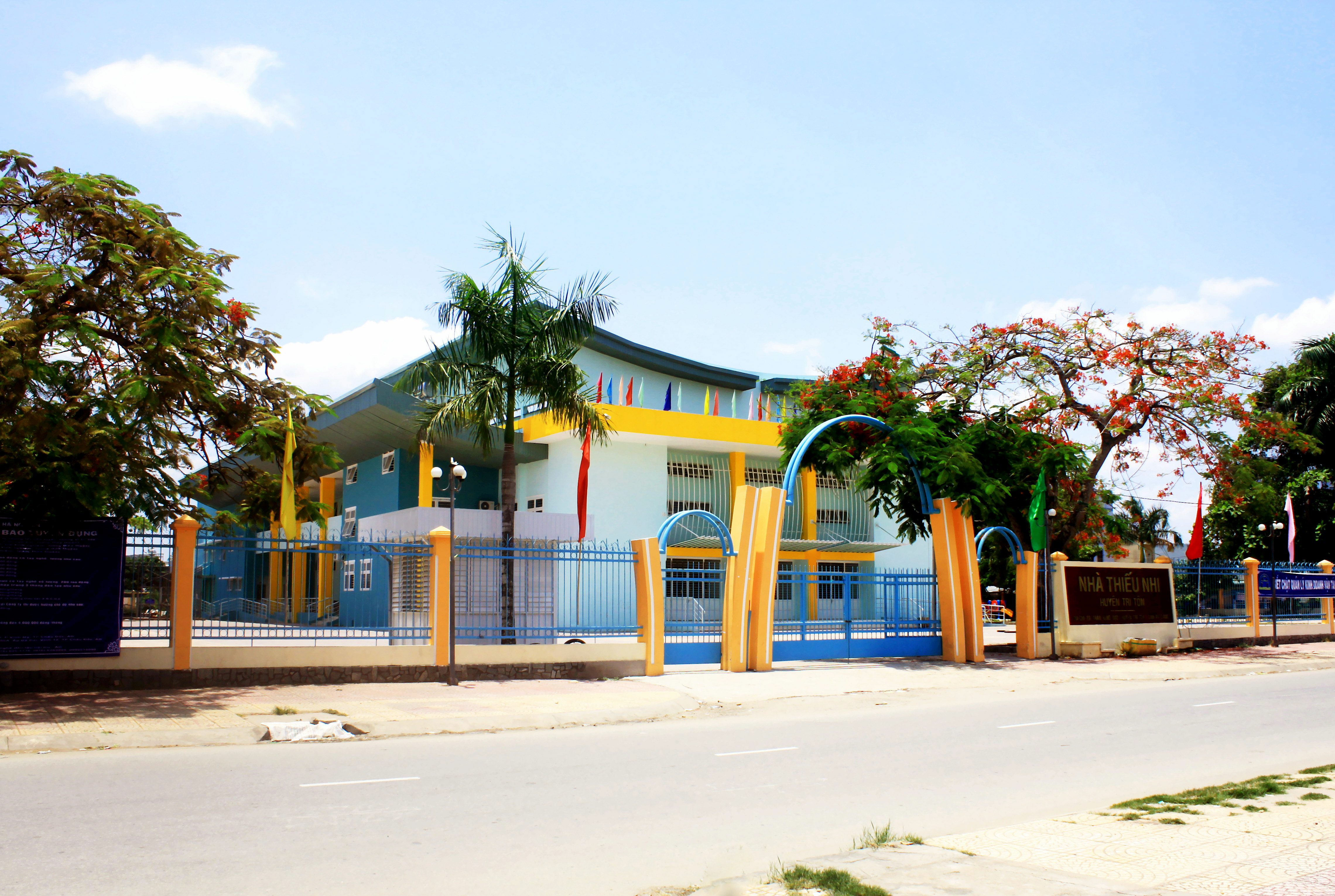 Nhà thiếu nhi huyện Tri Tôn, An Giang, Việt Nam.